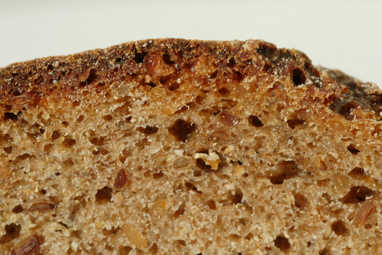 Kruste und Krume mit Poren bei Roggenvollkornbrot.